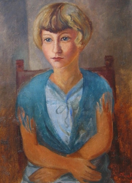 A girl. Oil on canvas, signed. Сергей Александрович Залшупин (псевдоним — Серж Шубин) (около 1901— 1931) — русский художник. .